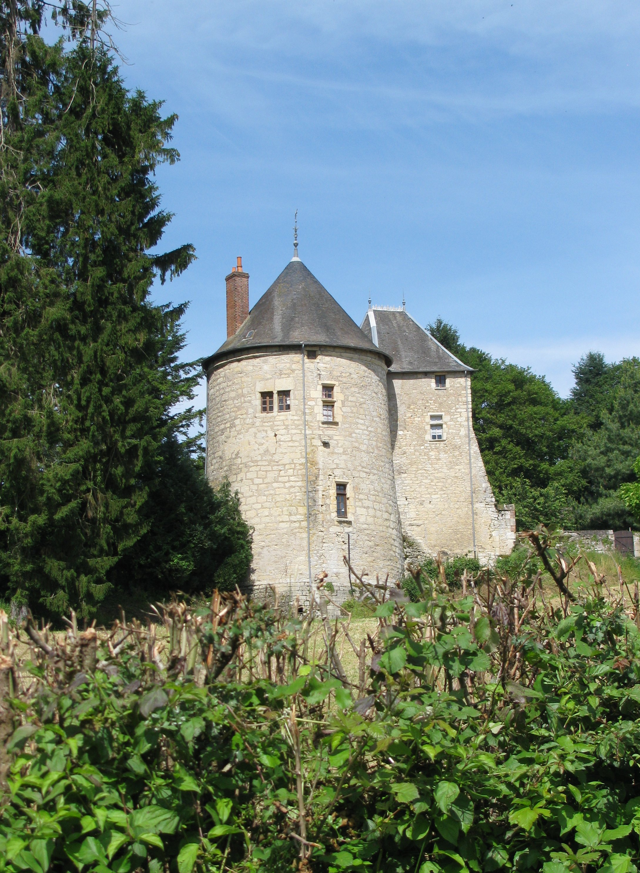 Frasnay-les-Chanoines, à Saint-Aubin-Les-Forges, Nièvre, France.